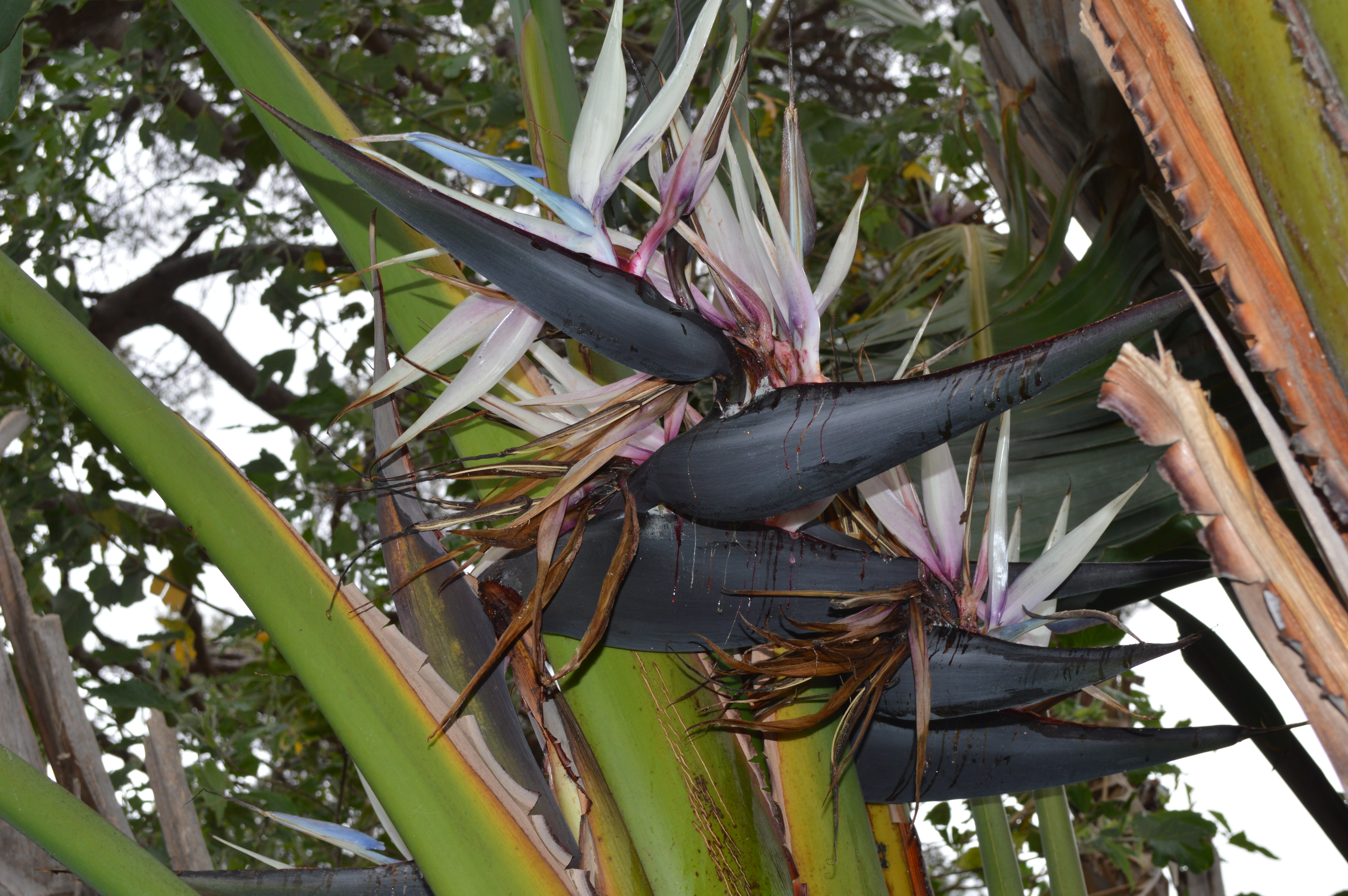 Strelizia alba